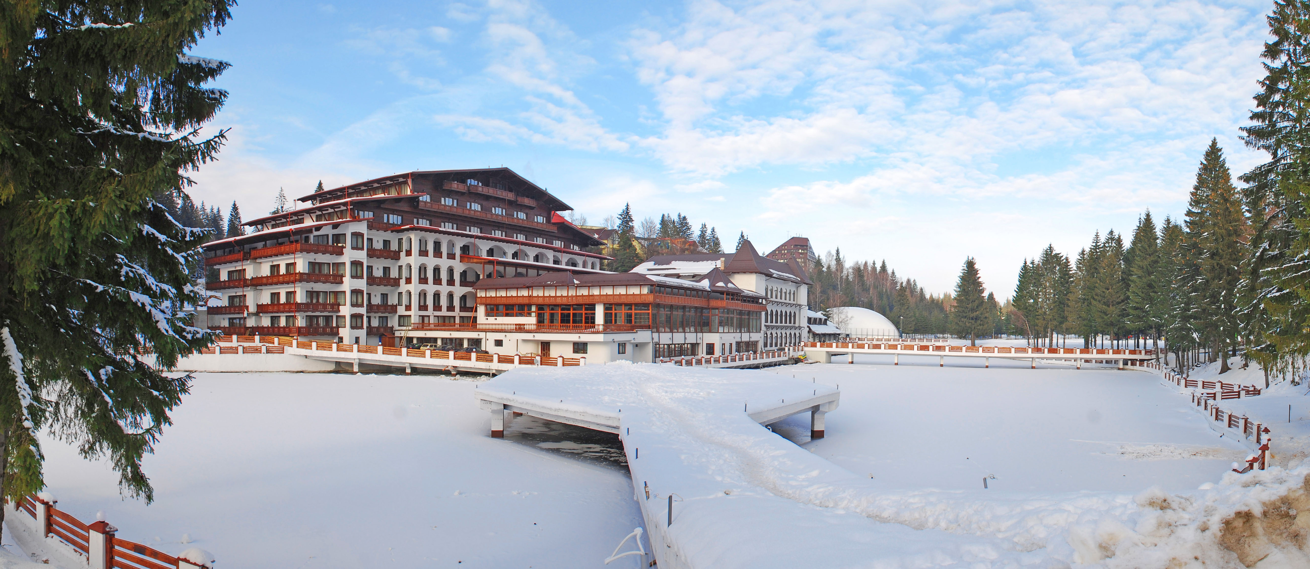 Poiana Braşov, Romania Nikon D80 + 18-135 25 December 2007